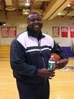 Corny Thompson